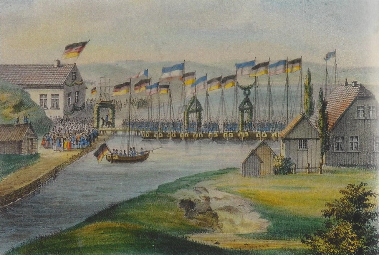 Ausschnitt aus einer Lithographie: Rückmarsch der Schleswig-Holsteinischen Truppen durch Angeln im Jahre 1849 auf einer Pontonbrücke über die Schlei